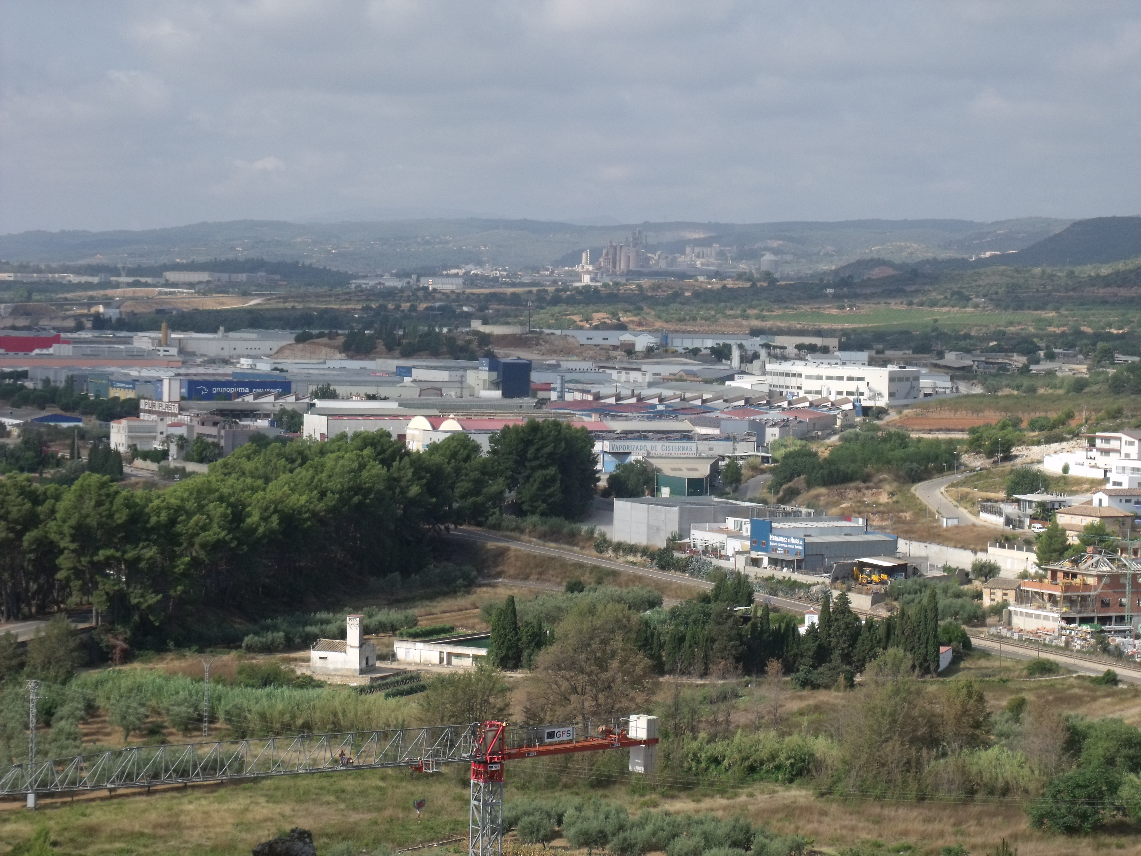 Polígono Industrial La Pahilla (Chiva, Valencia) desde el Castillo.